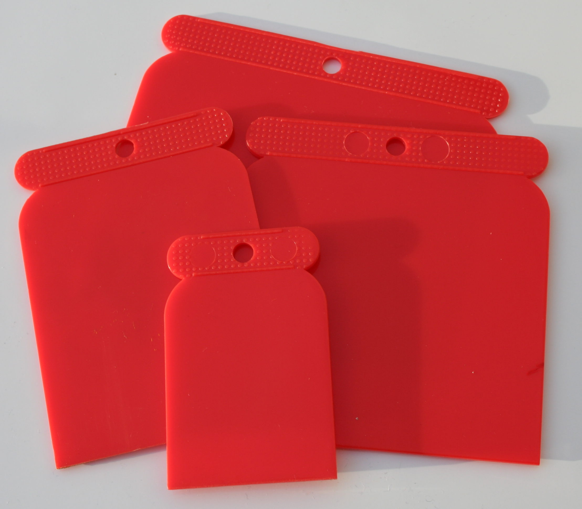 Blattspachtel